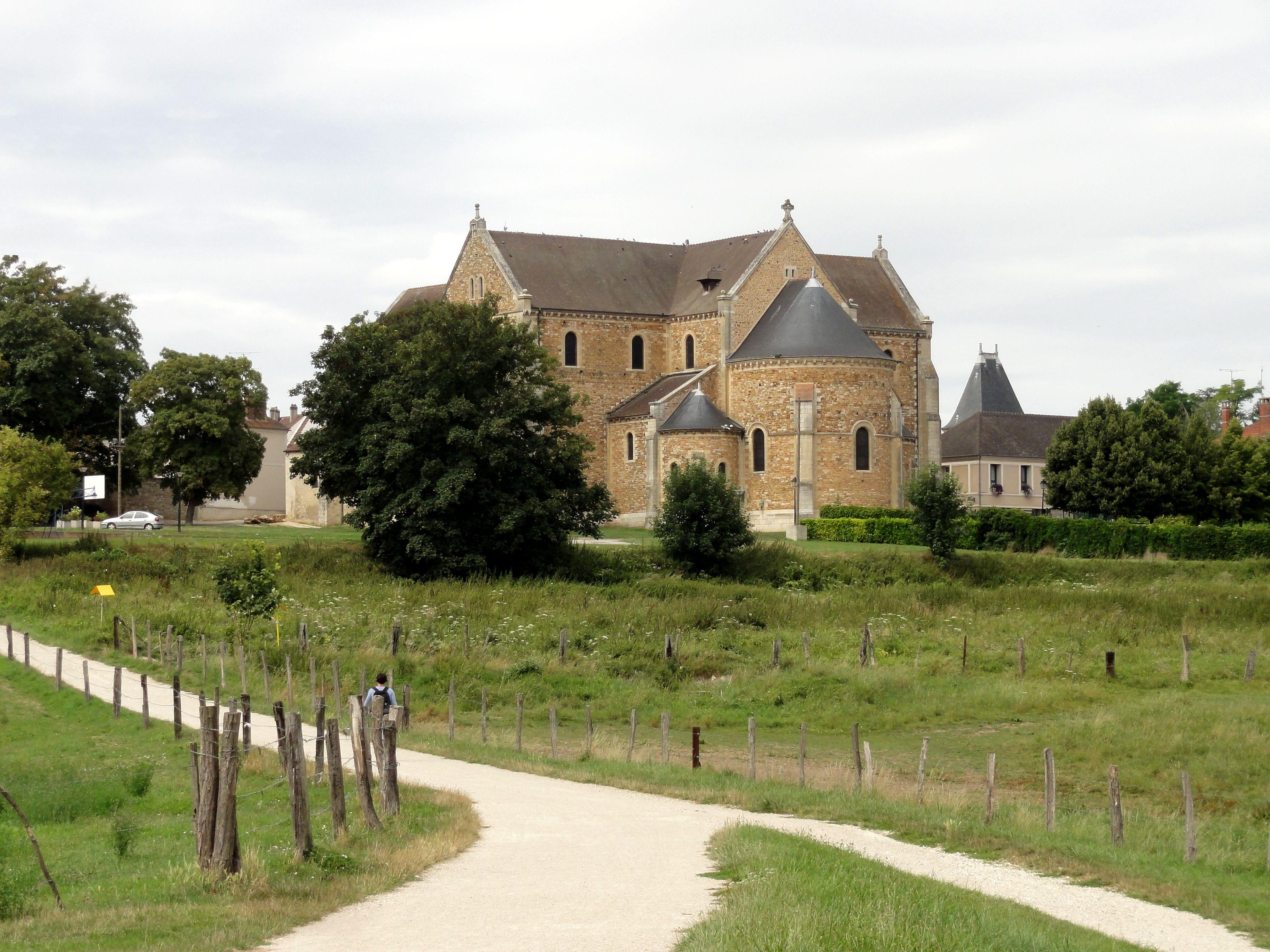 Vue depuis le sud-est.